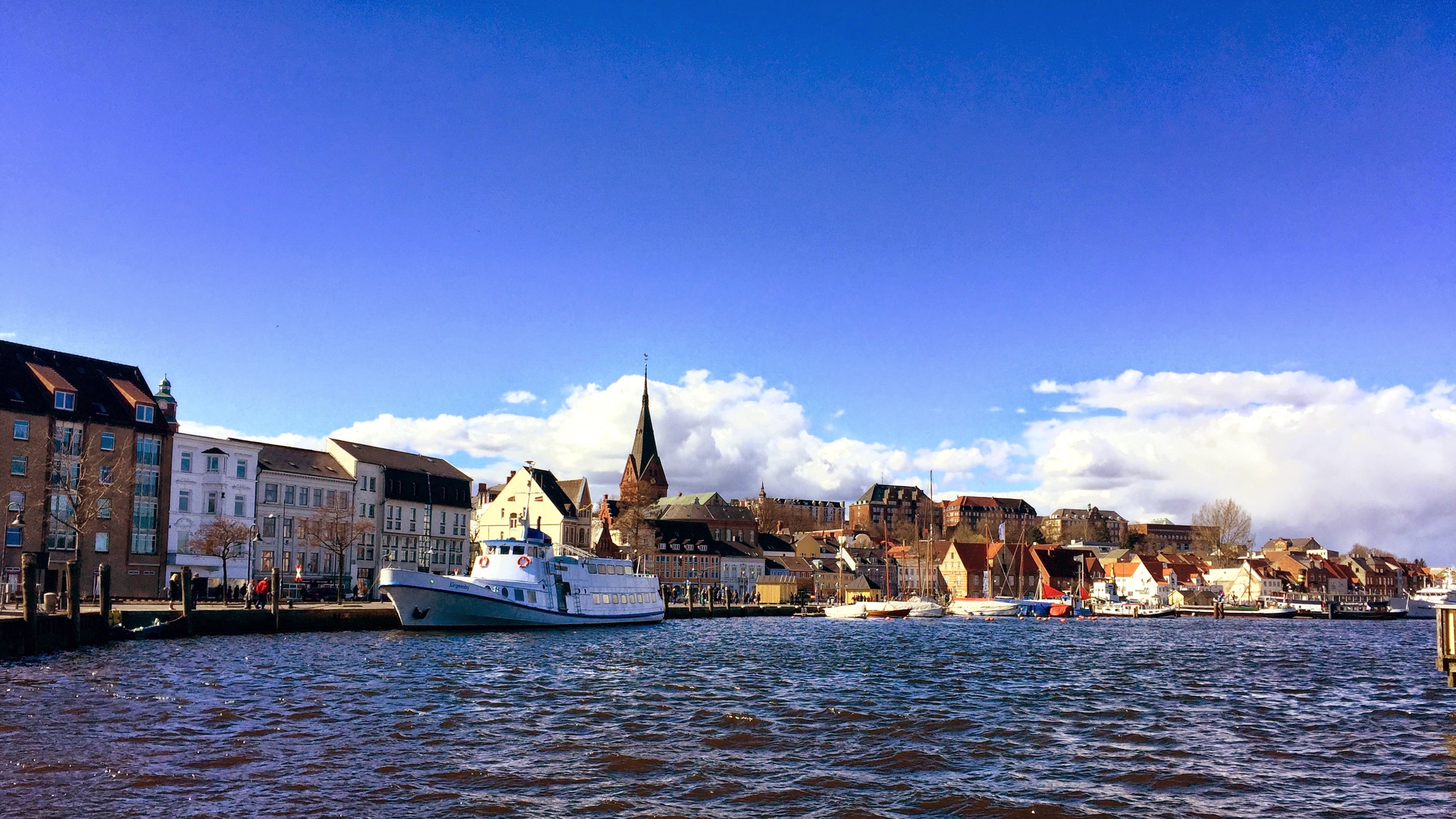 Blick auf das Westufer den Anleger Flensburger Fähr- Betrieb im Flensburger Hafen von der Hafenspitze aus.